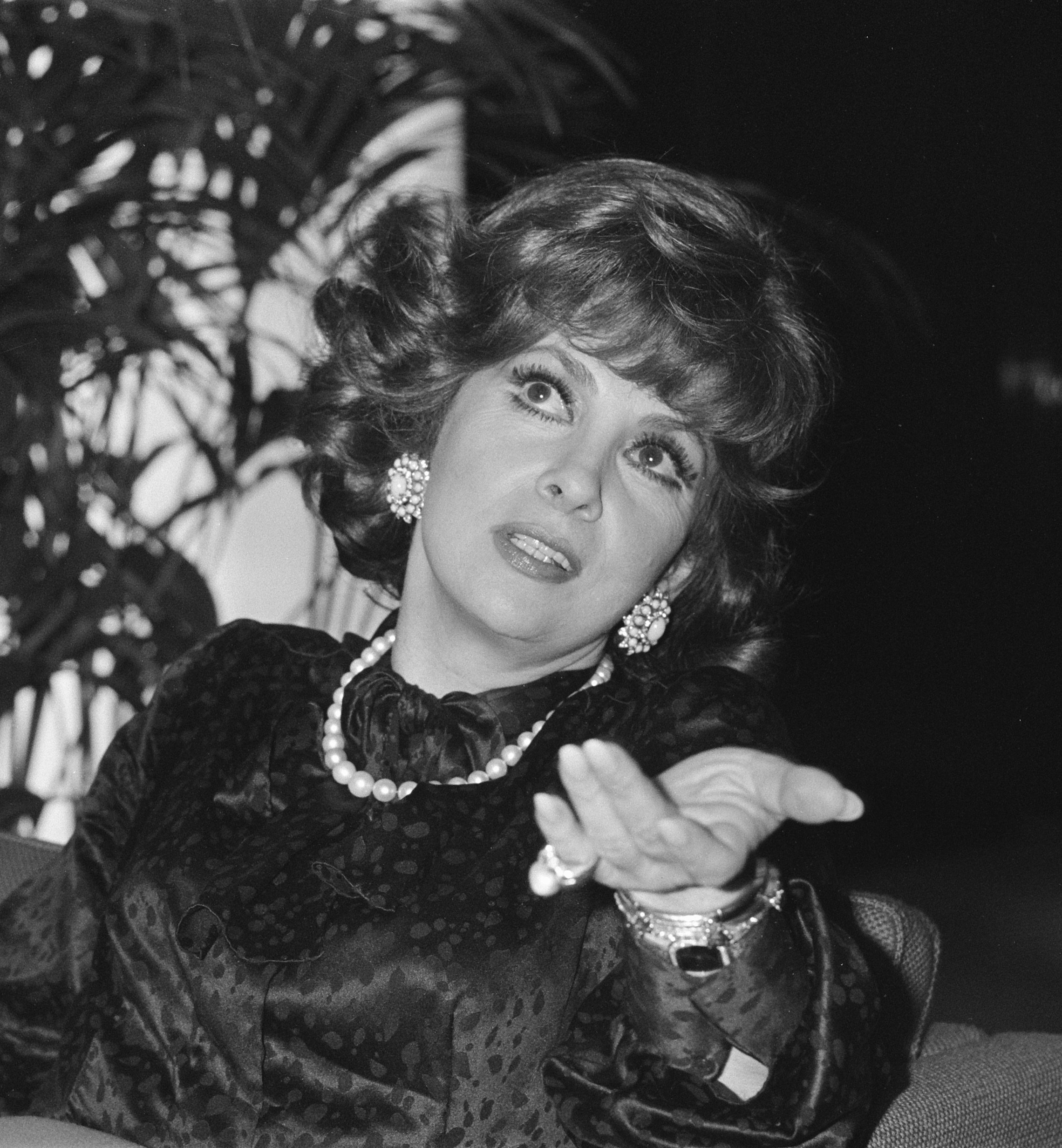 Op Schiphol filmster Gina Lollobrigida i.v.m. een in Rotterdam te openen expositie van door haar gemaakte foto's